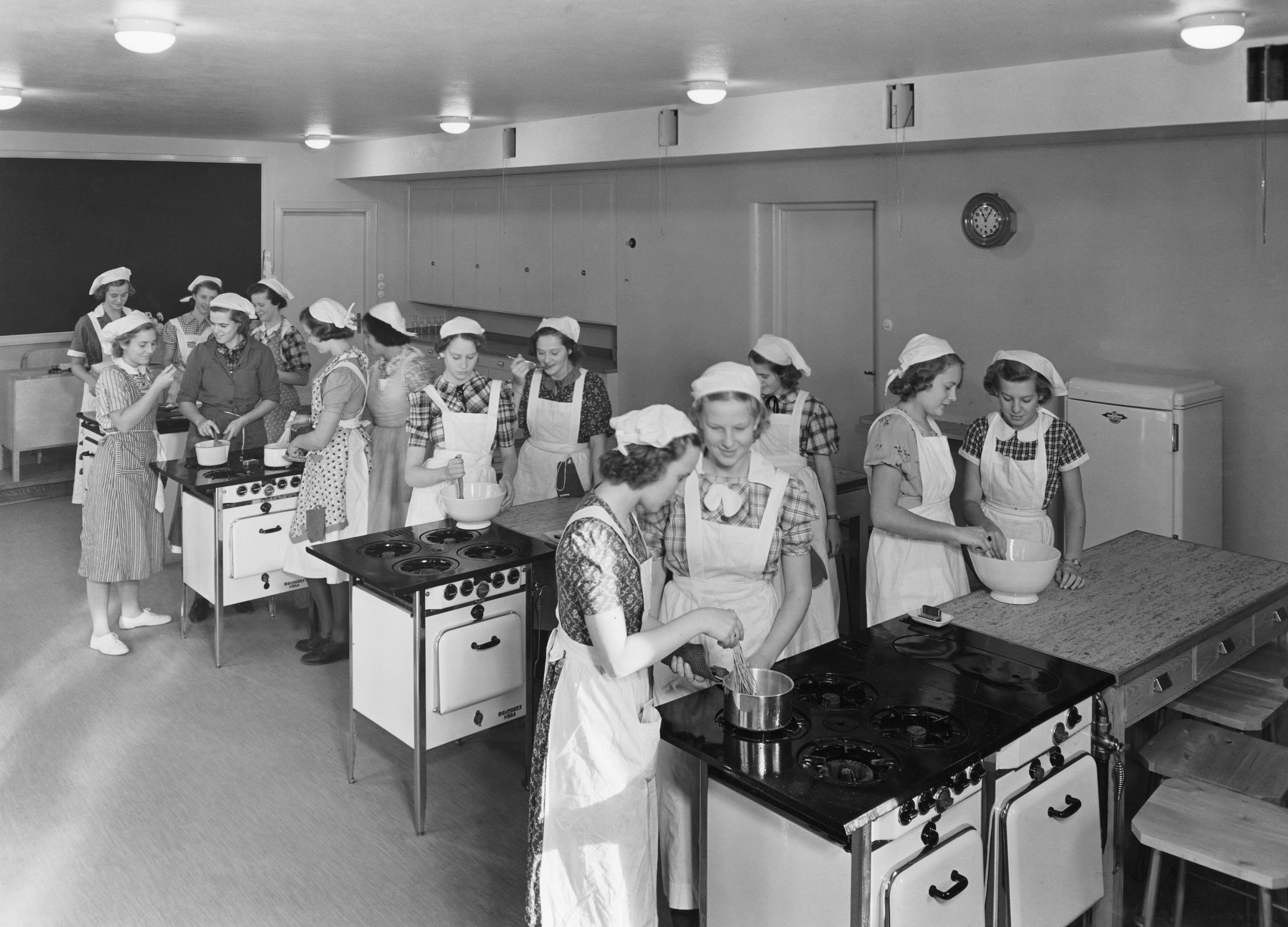 Lyceum för flickor (Östermalmsskolan) Interiör Skolkök med elever